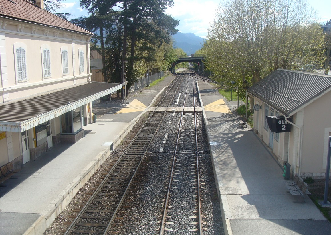 Gare d'Embrun (Hautes-Alpes) : quais et voies de service voyageurs (vue prise en direction de Gap)